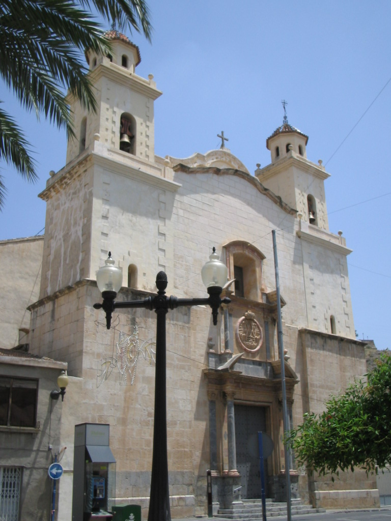 Santuario de Nuestra Señora de Monserrate (Orihuela)